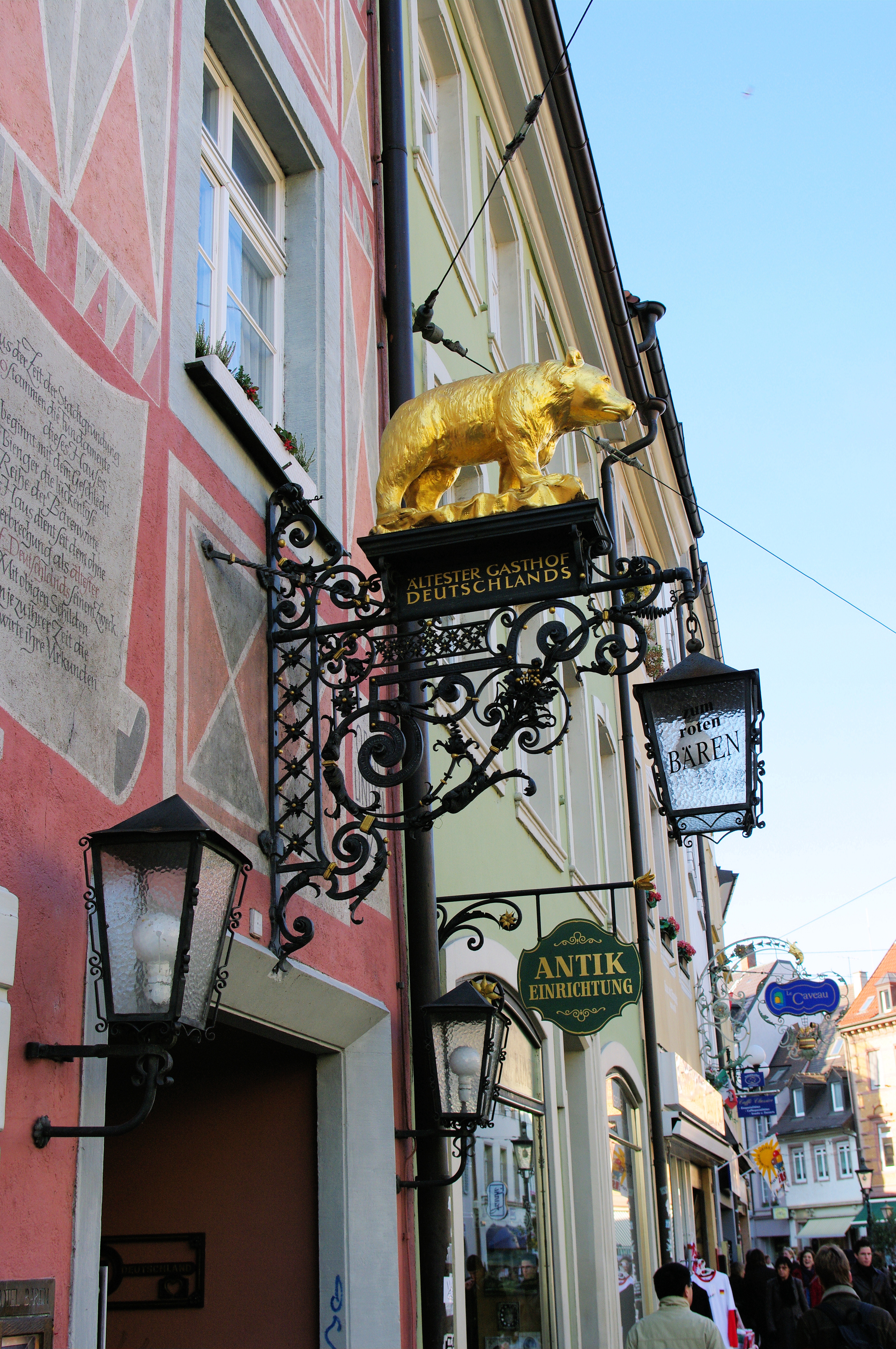 Hotel zum Bären Wirtshaustafel